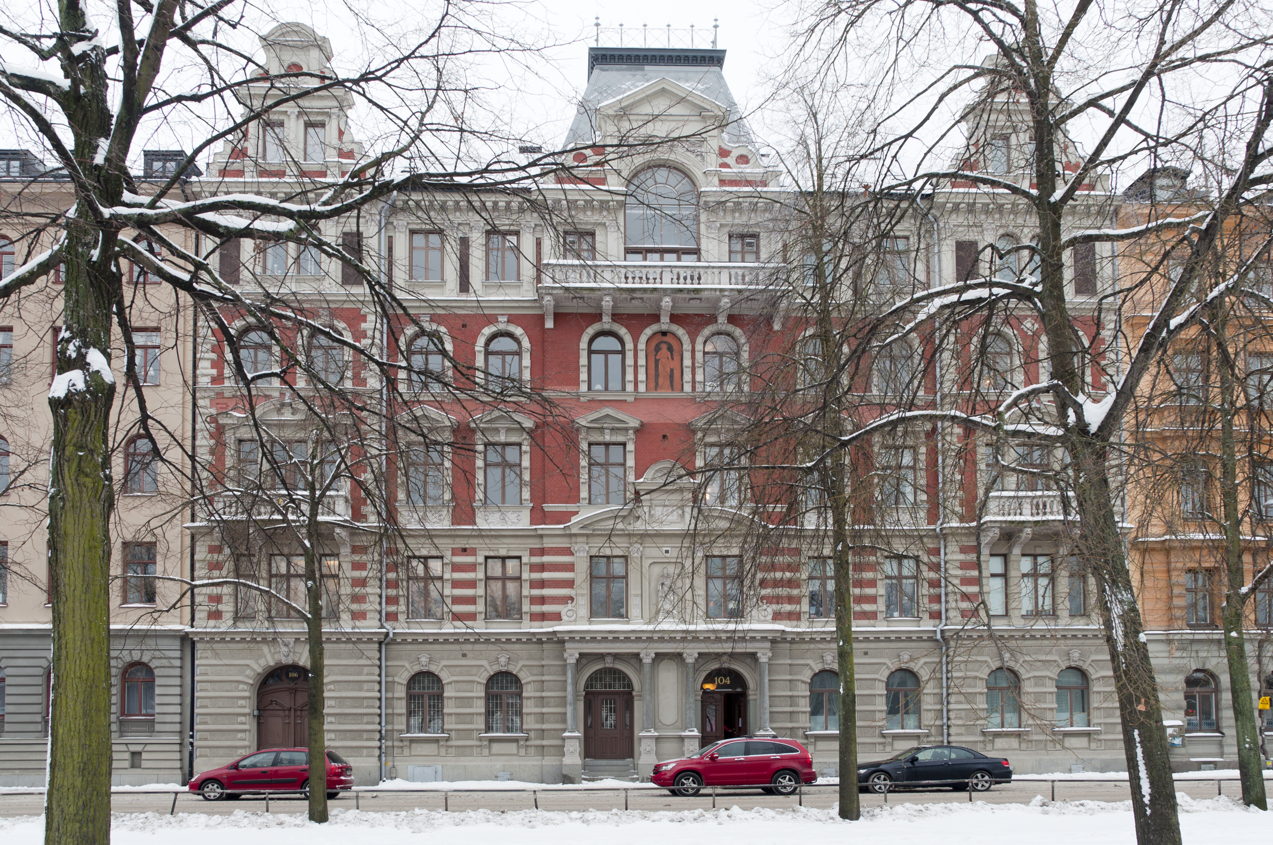 Valhallavagen 104-106. Byggnadsår 1887-88, arkitekt Johan Laurentz, byggherre och byggmästare J Nyberg